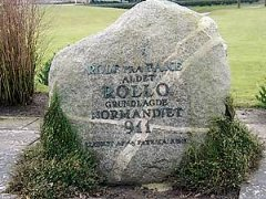 Rollostenen i Fakse